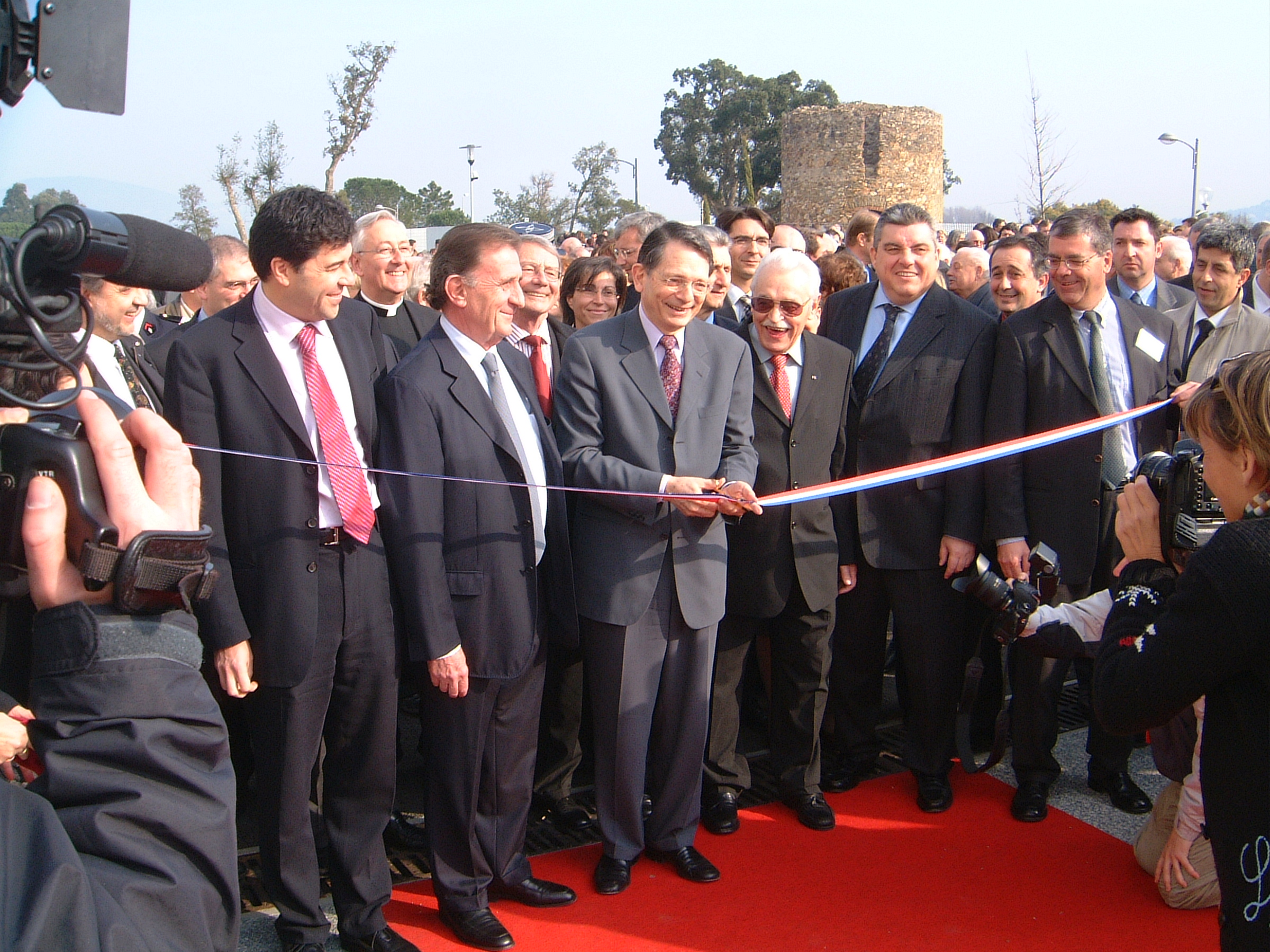 Inauguration du pôle de santé du golfe de Saint-Tropez avec Jean-François Mattéi, Jean-Michel Couve et Vincent Morisse